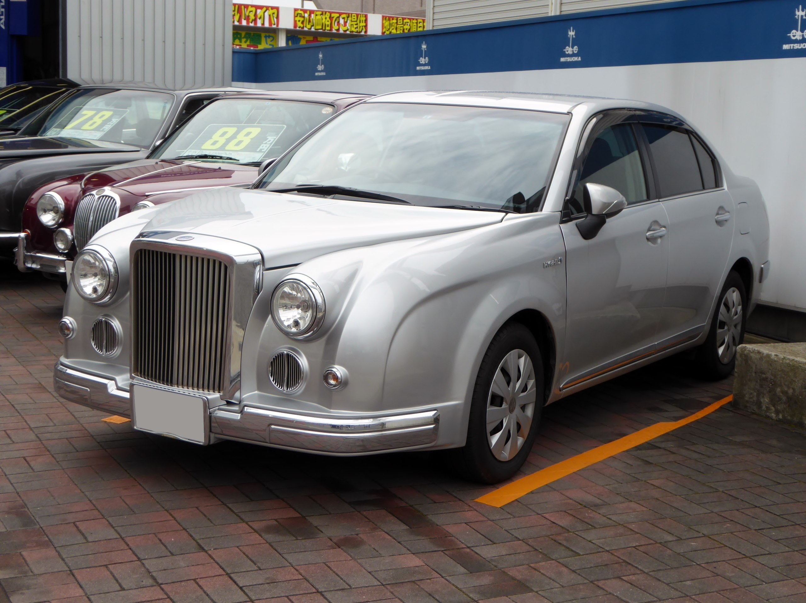 E165型光岡・リューギハイブリッドをフロントから撮影。